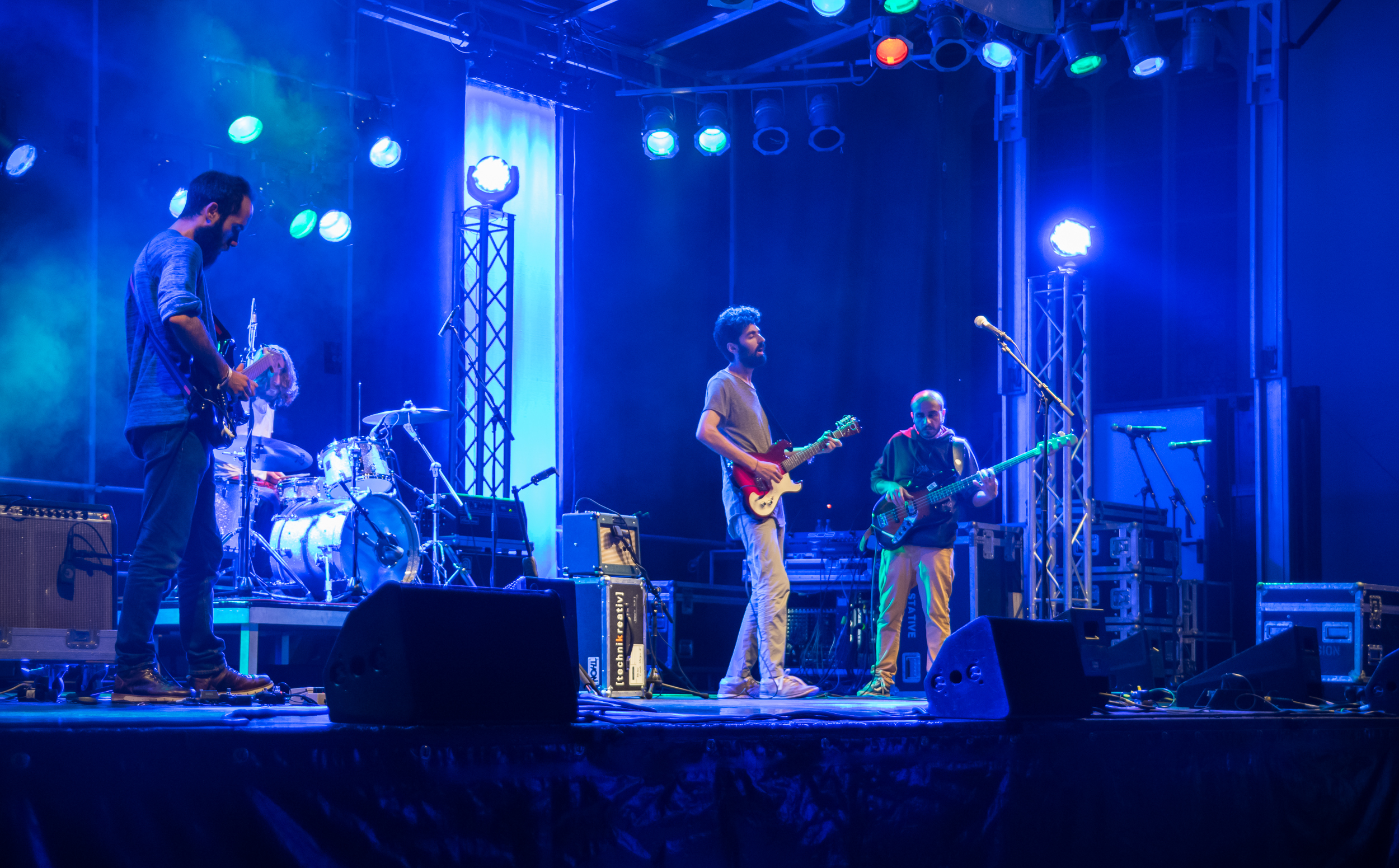 Die syrische Band Khebez Dawle auf der Detmolder Sommerbühne 2016